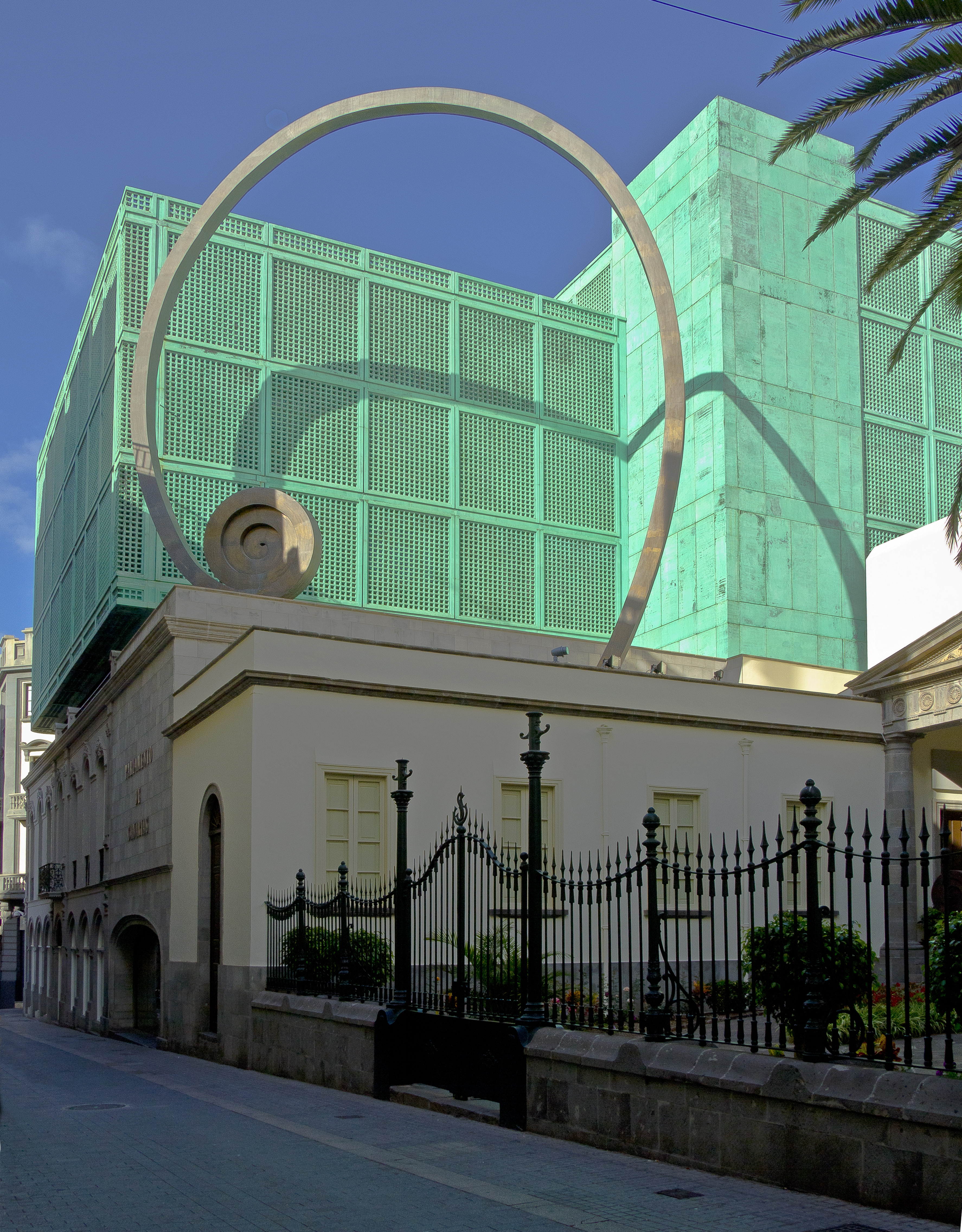 Das neue Gebäude des Kanarischen Parlamentes in Santa Cruz de Tenerife (Spanien) mit einer Plastik des aus Las Palmas de Gran Canaria, stammenden Künstlers Martín Chirino López.